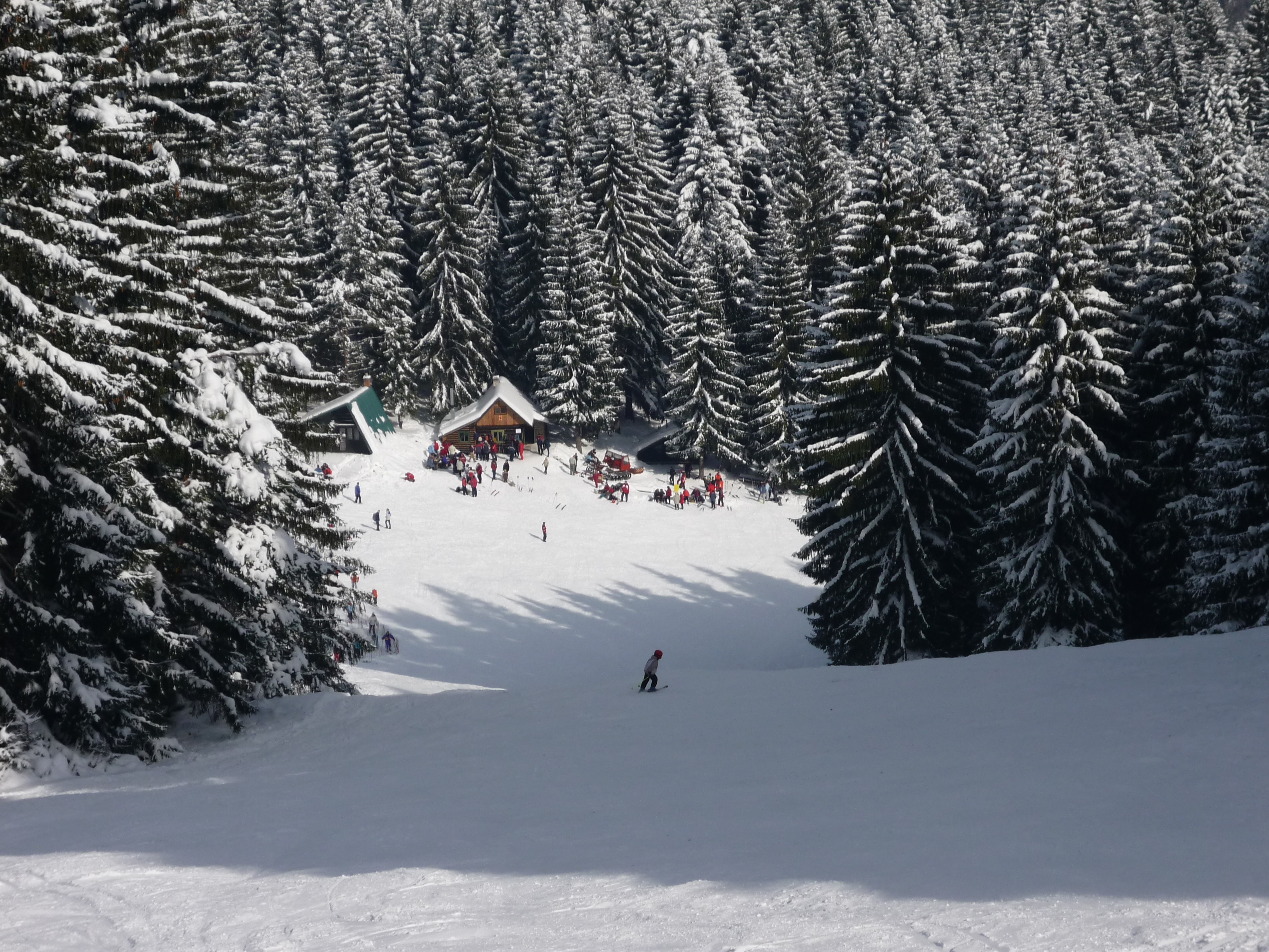 Lyžiarske stredisko Holý diel